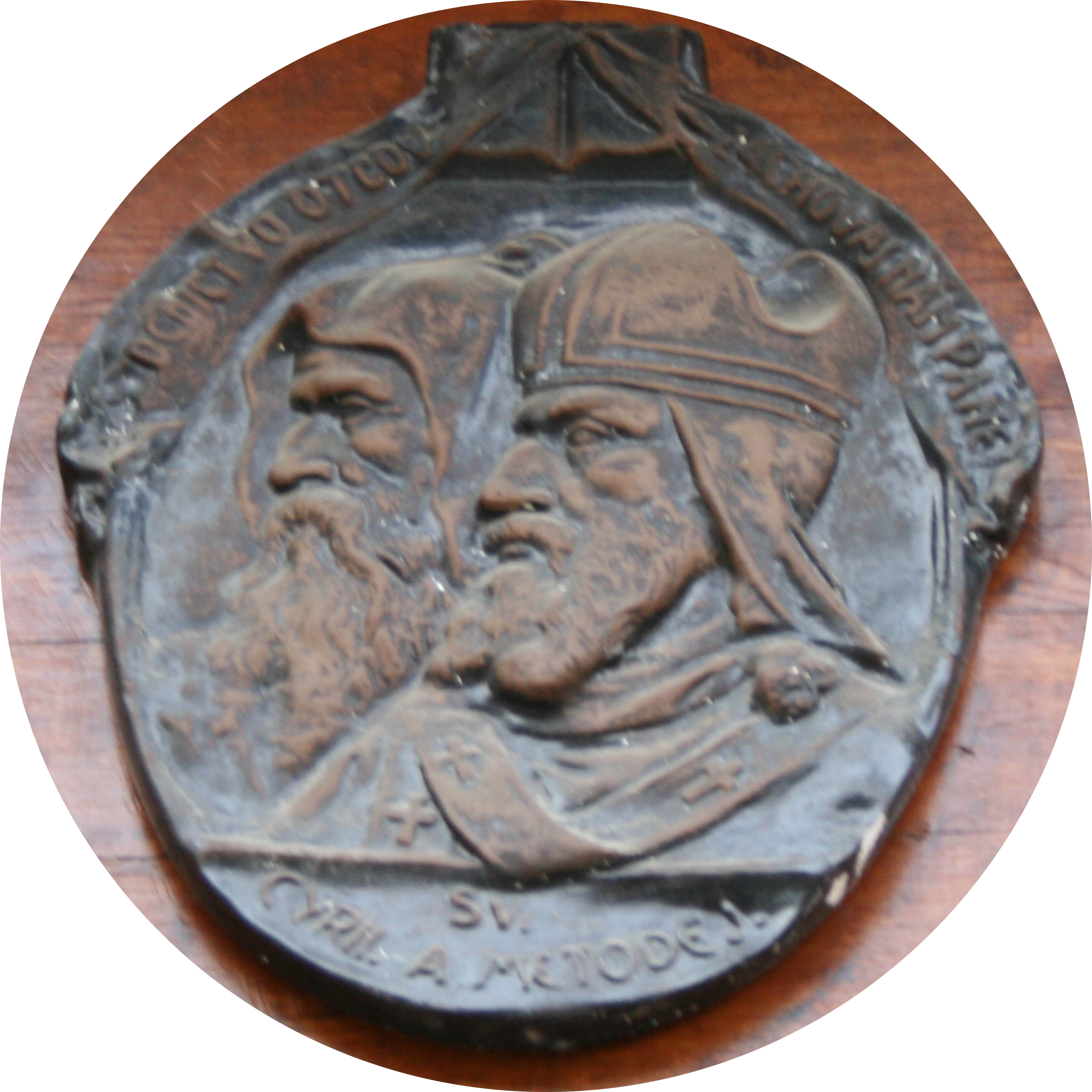 Reliéf na bráne, ktorého autorom v 30. rokoch 20. storočia bol Alojz Rigele